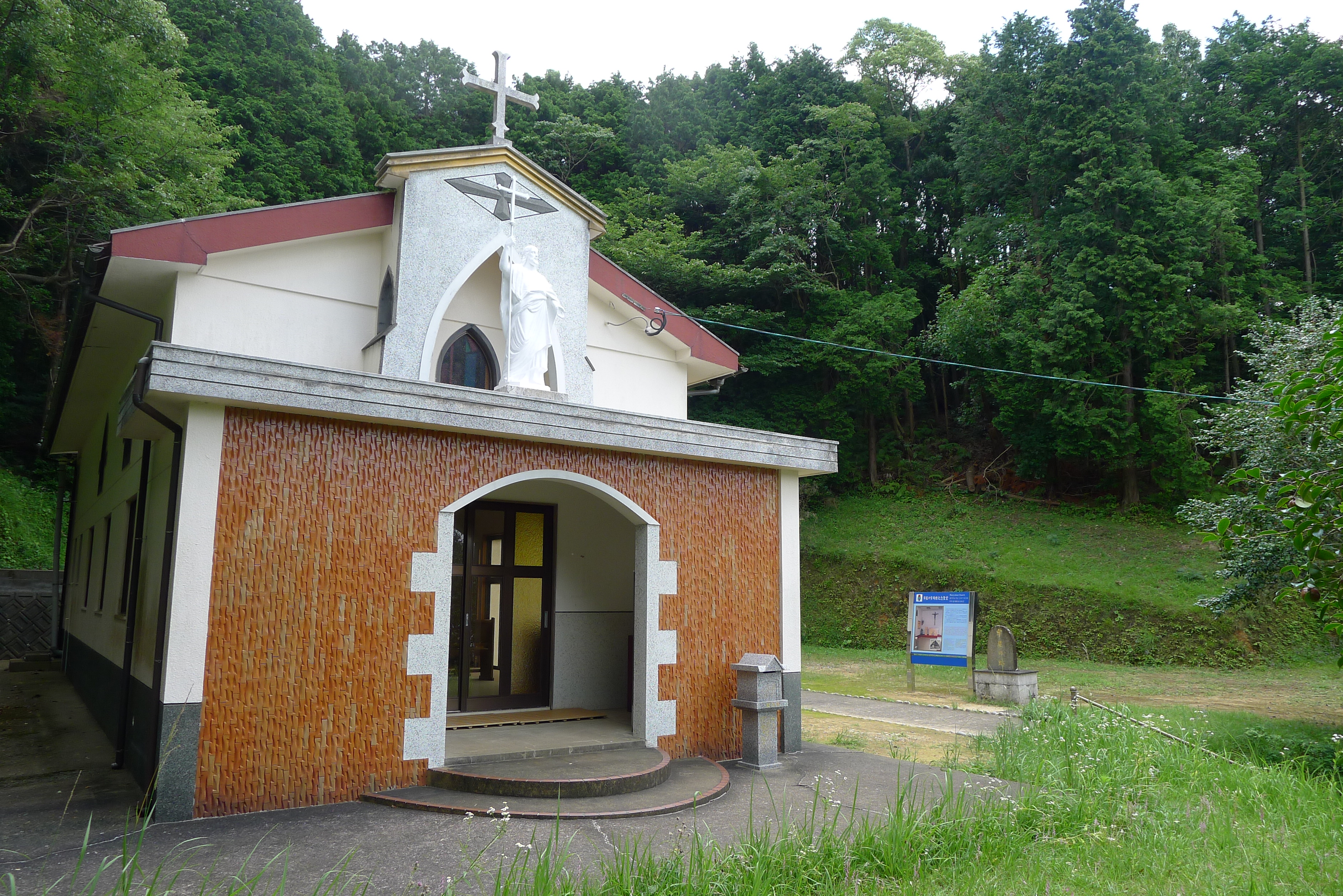 五島崩れで隠れキリシタンが押し込められた牢屋跡脇に建てられた牢屋の窄殉教記念教会